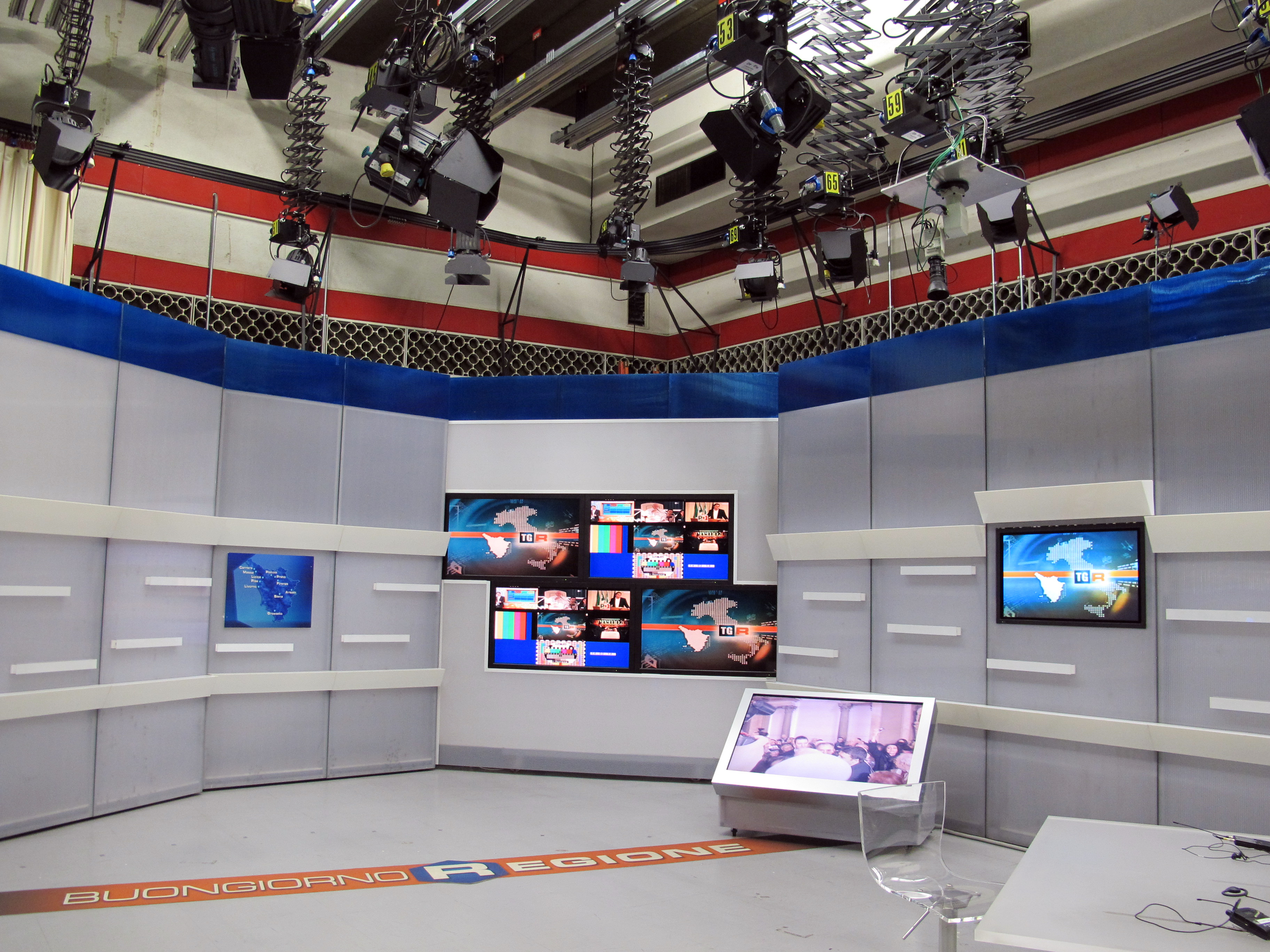 RAI (Firenze)